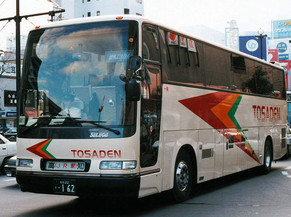 土佐電鉄 龍馬エクスプレス 日野セレガGD